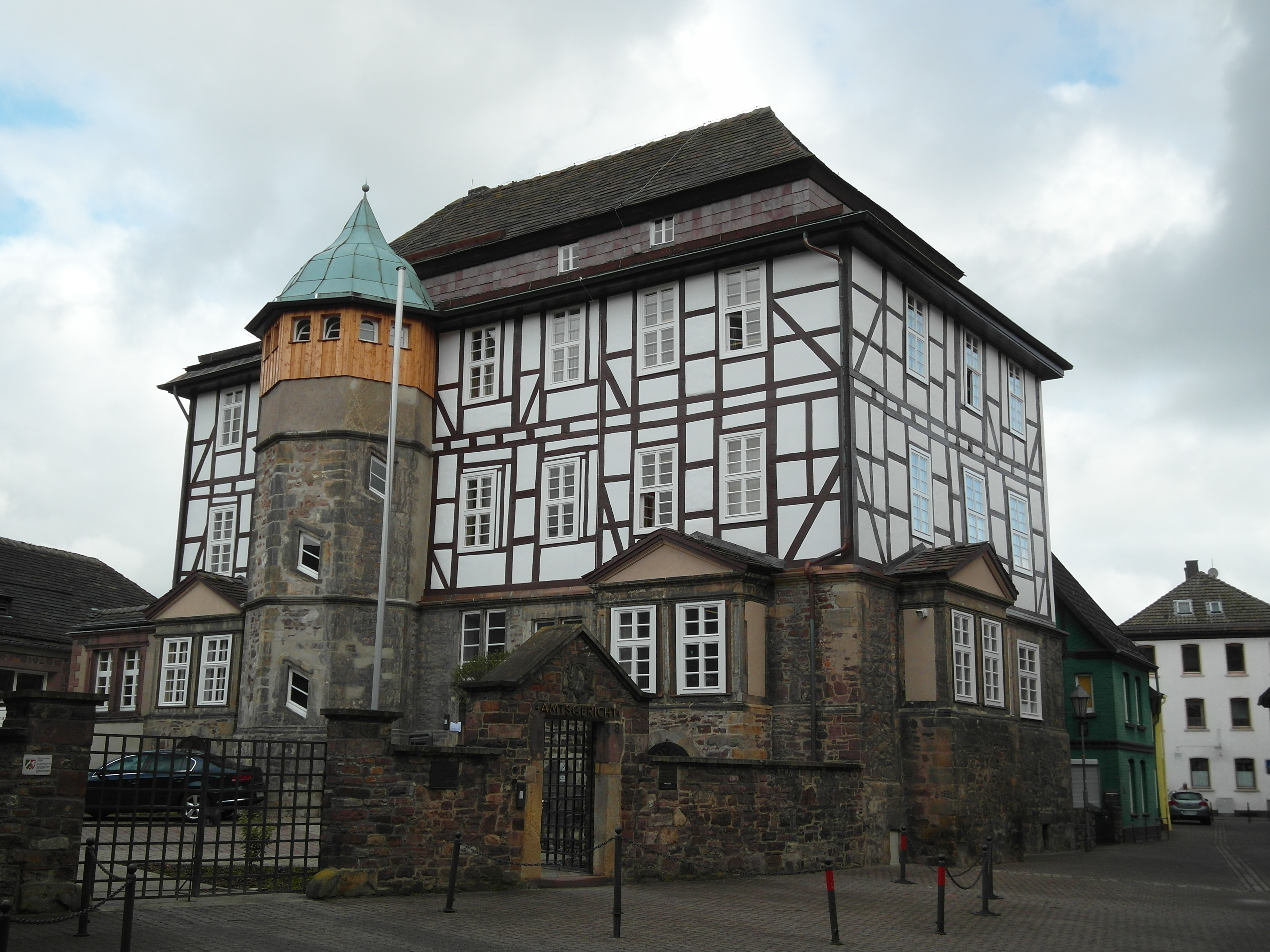 Dieses Foto zeigt das heutige Amtsgericht Höxter, ehemals Adelshof. This is a photograph of an architectural monument.